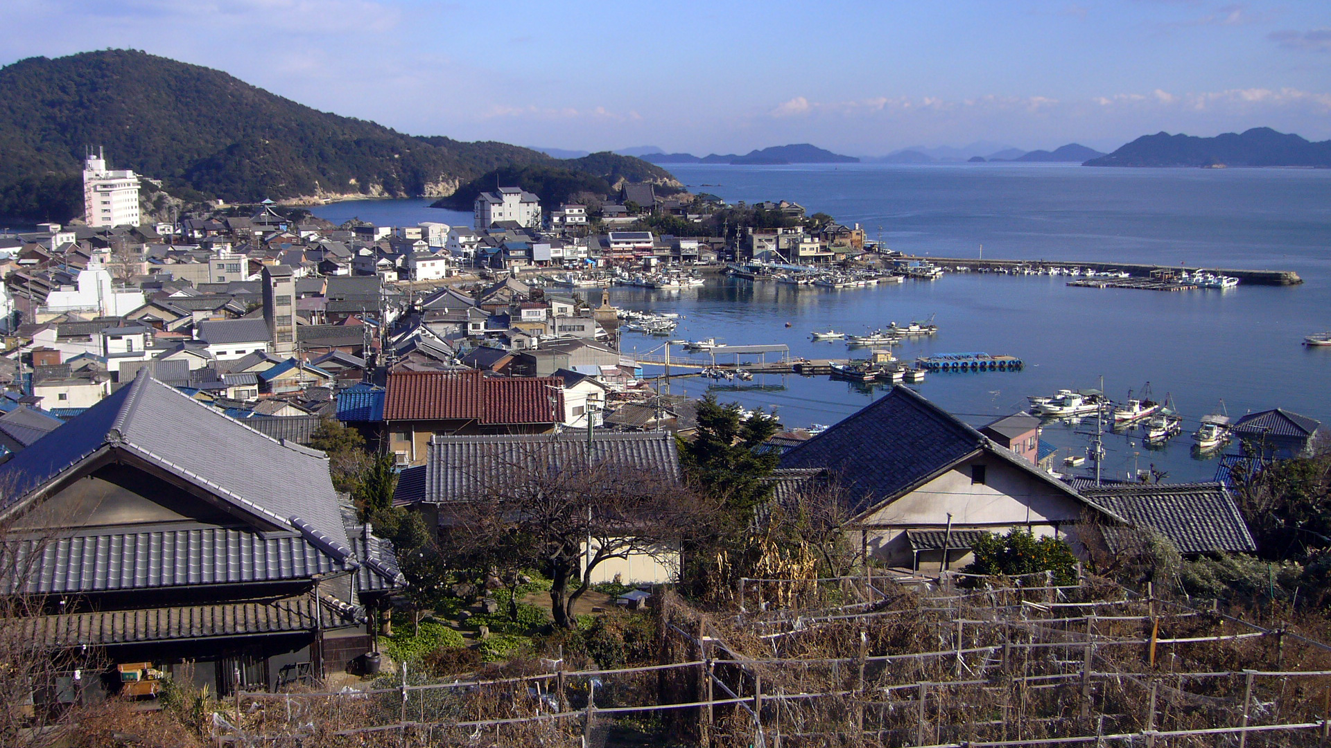 Tomonoura in Fukuyama, Hiroshima, Japan